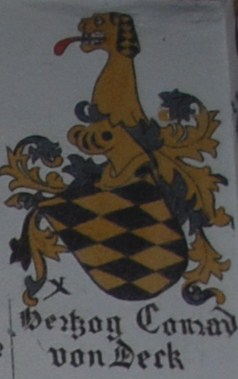 Wappen des Conrad von Deck. Wandgemälde in der Schlachtkapelle Sempach